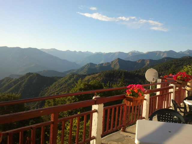 Vue sur le massif du Mercantour depuis le scnack "La Terrasse" (Païra-Cava)